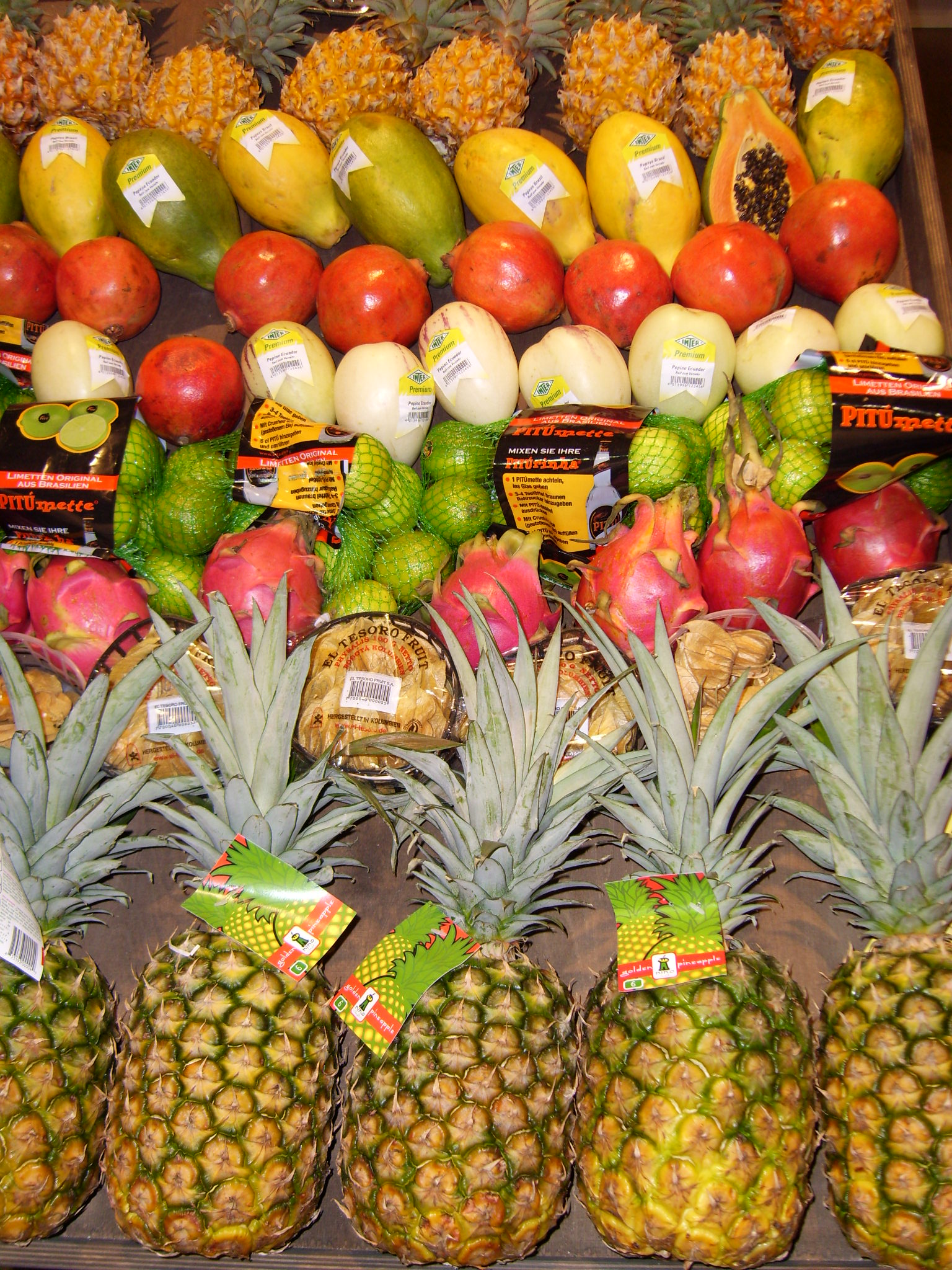 Früchte auf der Fruit Logistica